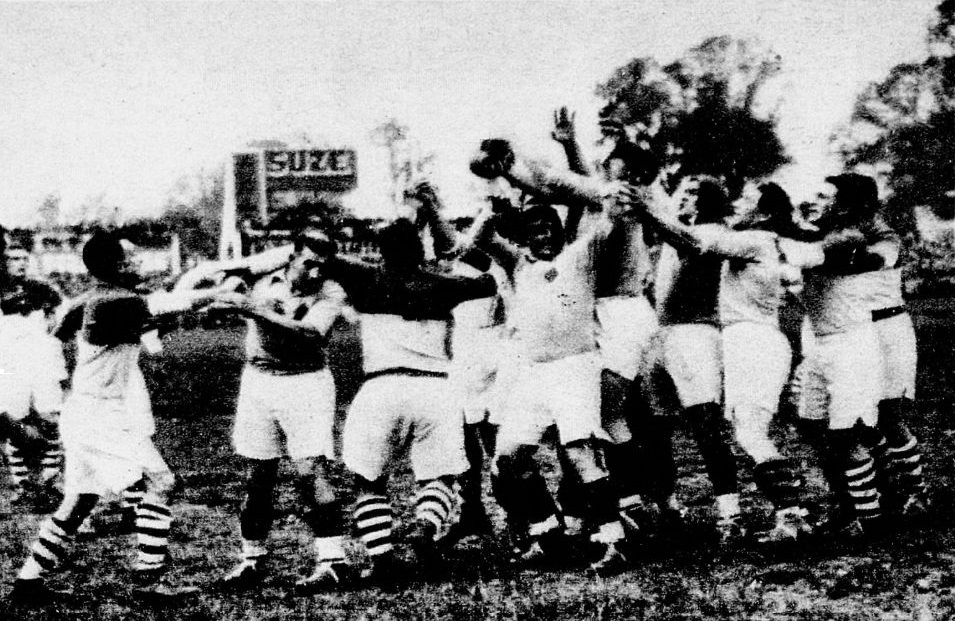 Championnat de France de rugby 1935, Biarritz - USAP, touche pour Perpignan (G. à D. Vails Georges, Munna, Bousquet (avec le ballon), Danoy et Raynal.